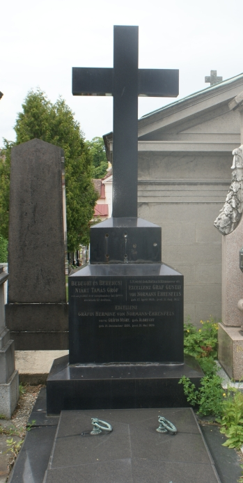 Hietzinger Friedhof-Hermine Albrecht